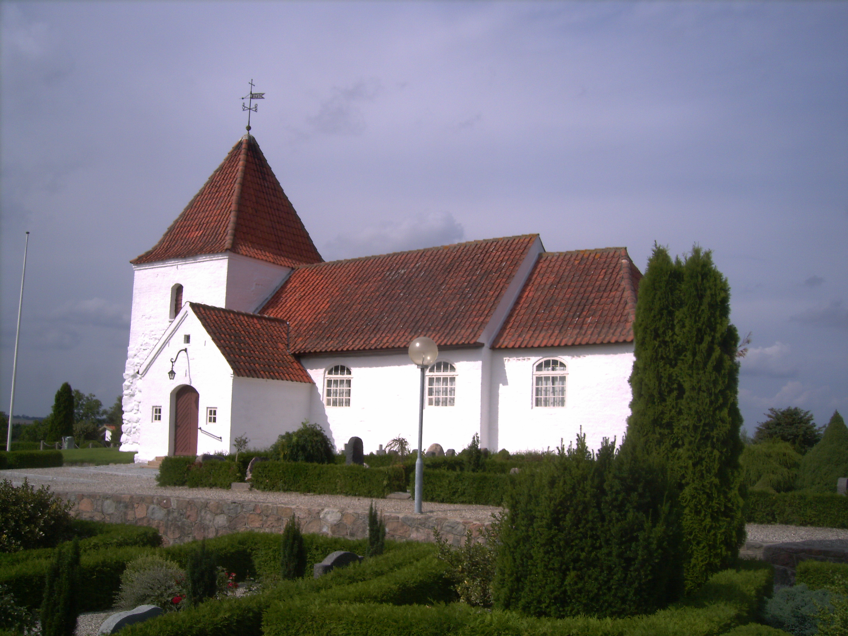 Udby Kirke,Rougsø Kommune